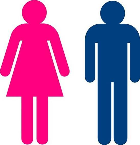 Kodearen bitartez esan dezakegu pertsona arrosa neska dela eta urdina gizona. Irakurketa konnotatiboa eginez ondoriozta dezakegu honako hauek komunen ateetan daudela jarrita.